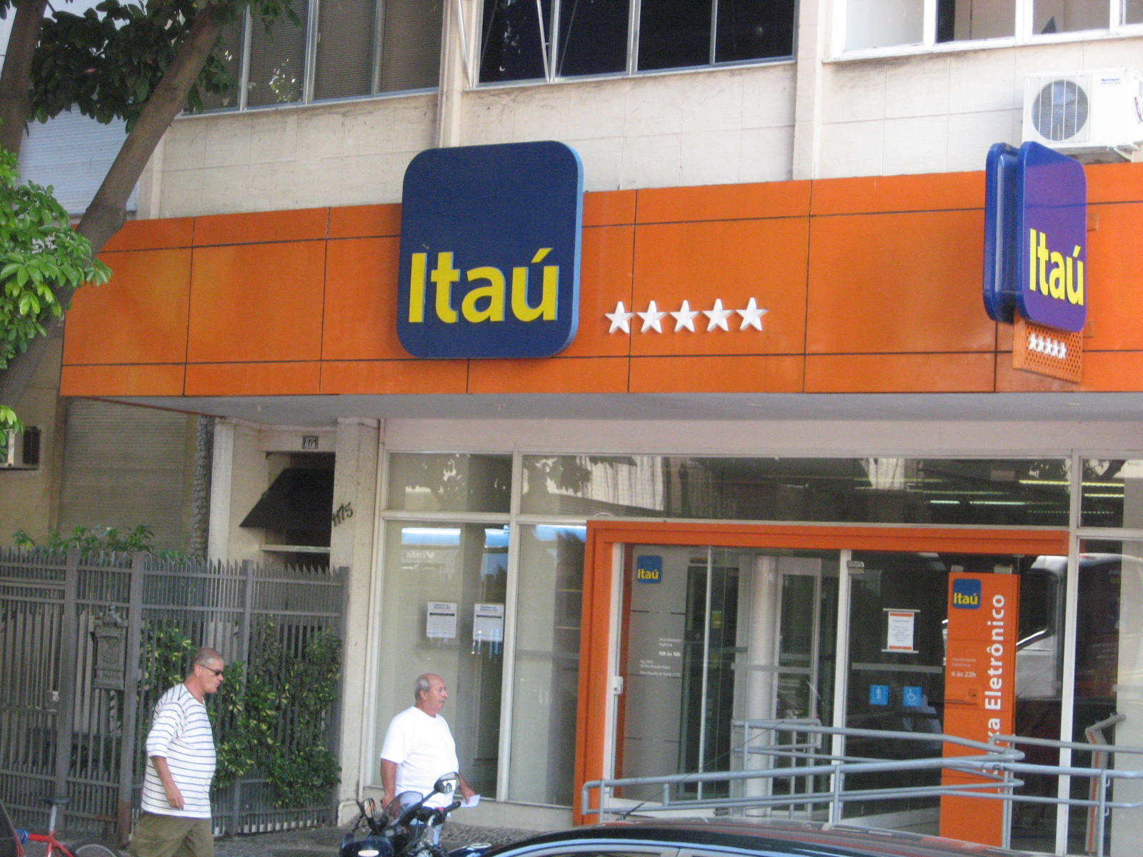 Agência do Banco Itaú, no Leblon, cidade do Rio de Janeiro.